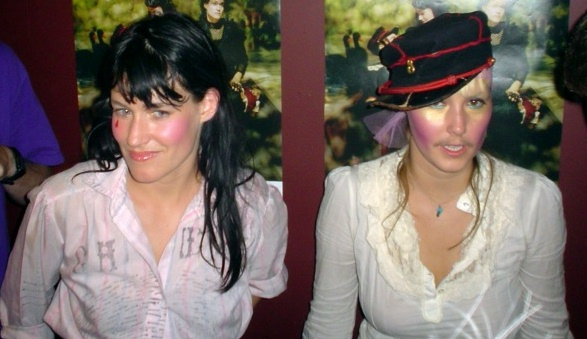 CocoRosie (Casady sisters)